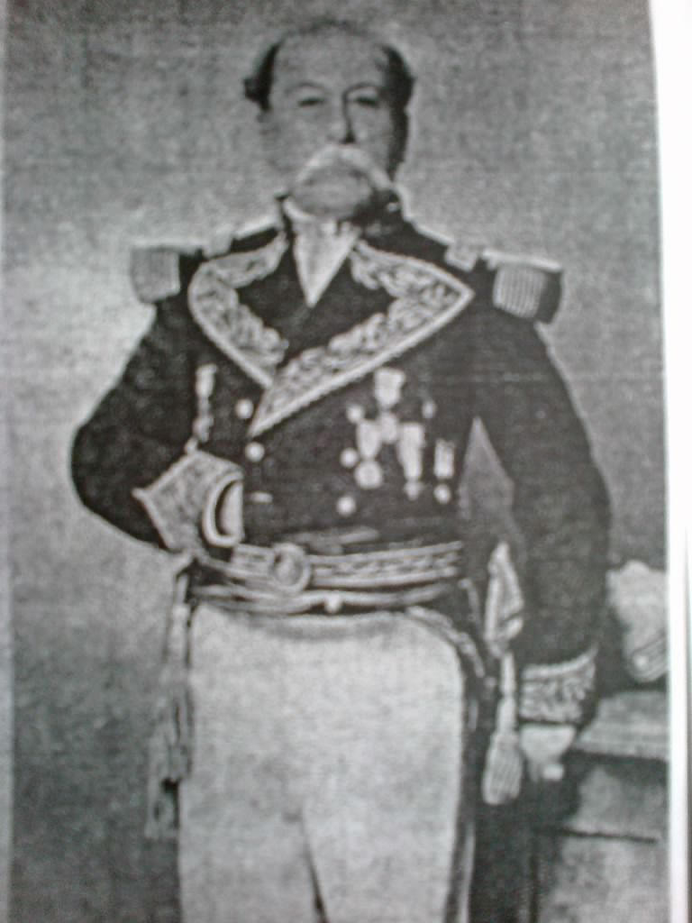 Fotografía del General Don Nicomedes Castro